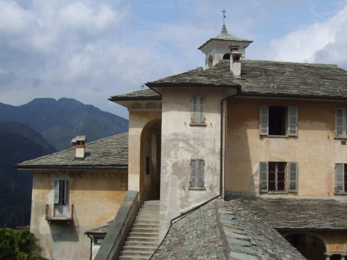 Sacro Monte di Varallo, Varallo Sesia, Italy